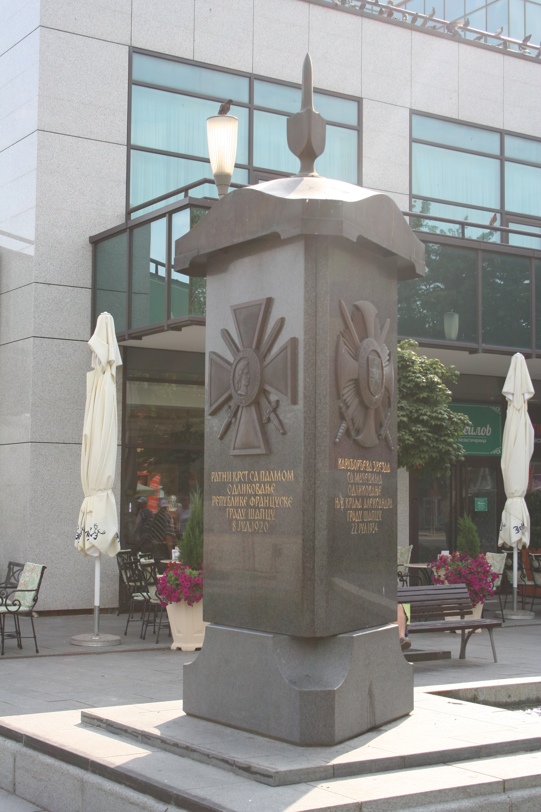 Spomenik šabačkim odlikovanjima sa fontanom